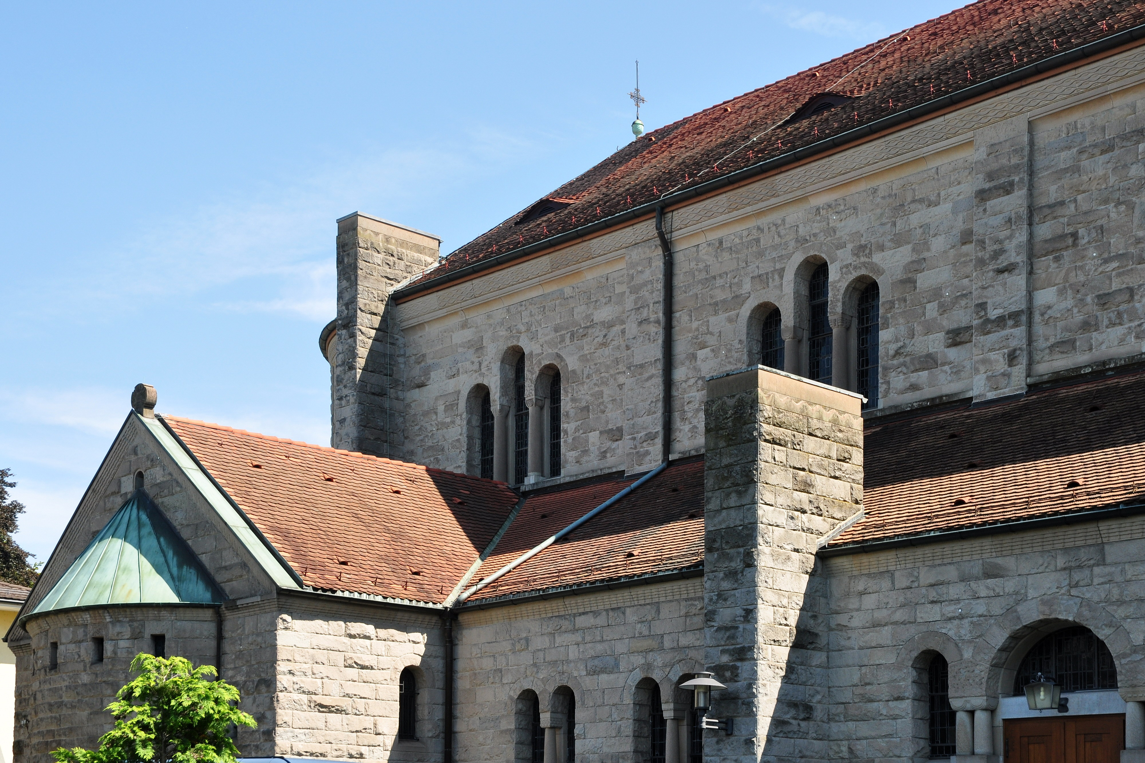 Katholische Kirche St. Antonius in Zürich-Hottingen (Switzerland)